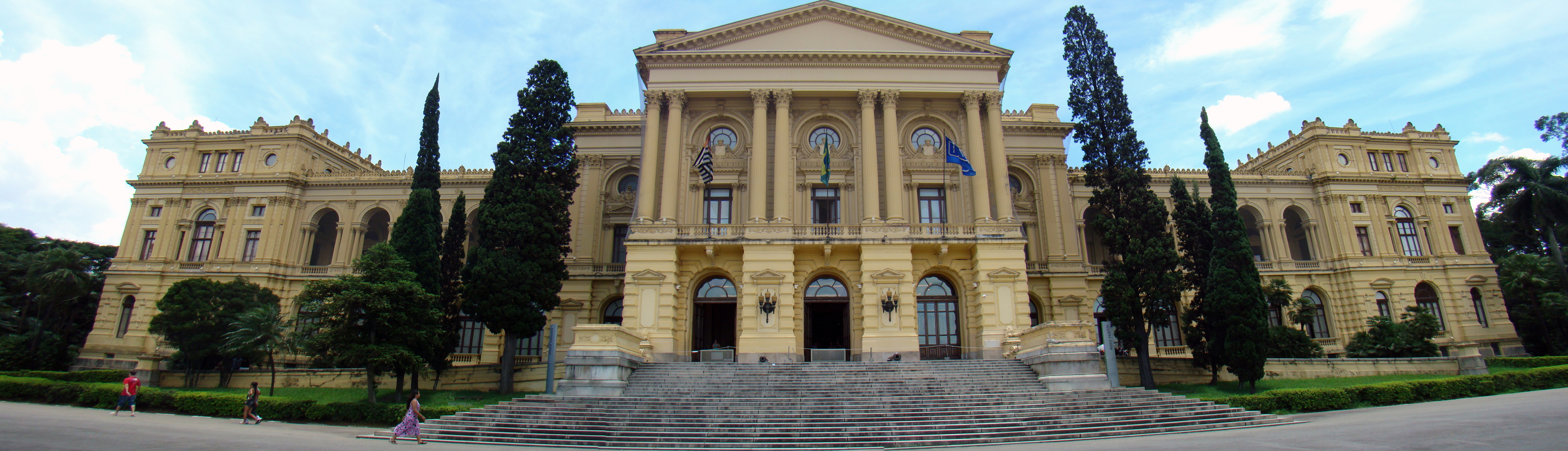 Panorama do Museu do Ipiranga, São Paulo, Brasil.